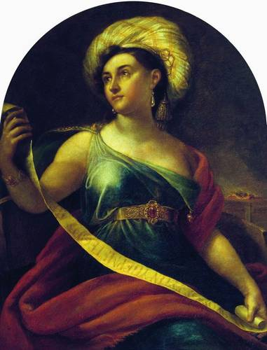 Портрет Н.С.Семеновой в роли Сивиллы Дельфийской. 1828 Холст, масло. 110 x 90 см Государственный центральный театральный музей им. А.А.Бахрушина